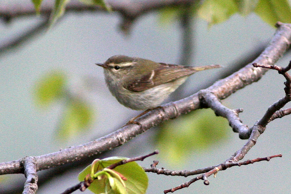 Taibai Shan, Shaanxi Phylloscopus yunnanensis